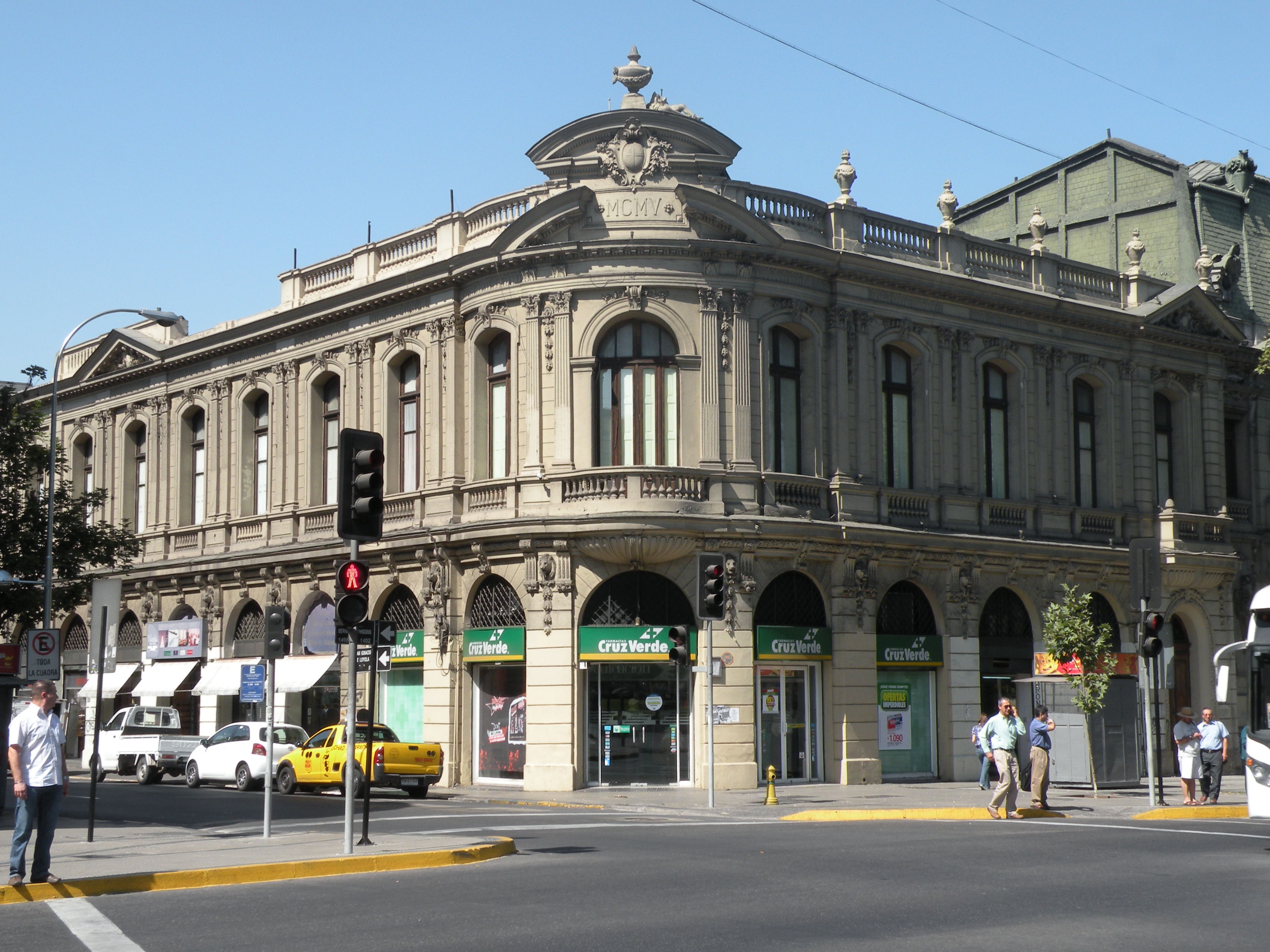 Palacio Ochagavía, junto al Palacio Irarrázabal, son la actual sede del Círculo Español.